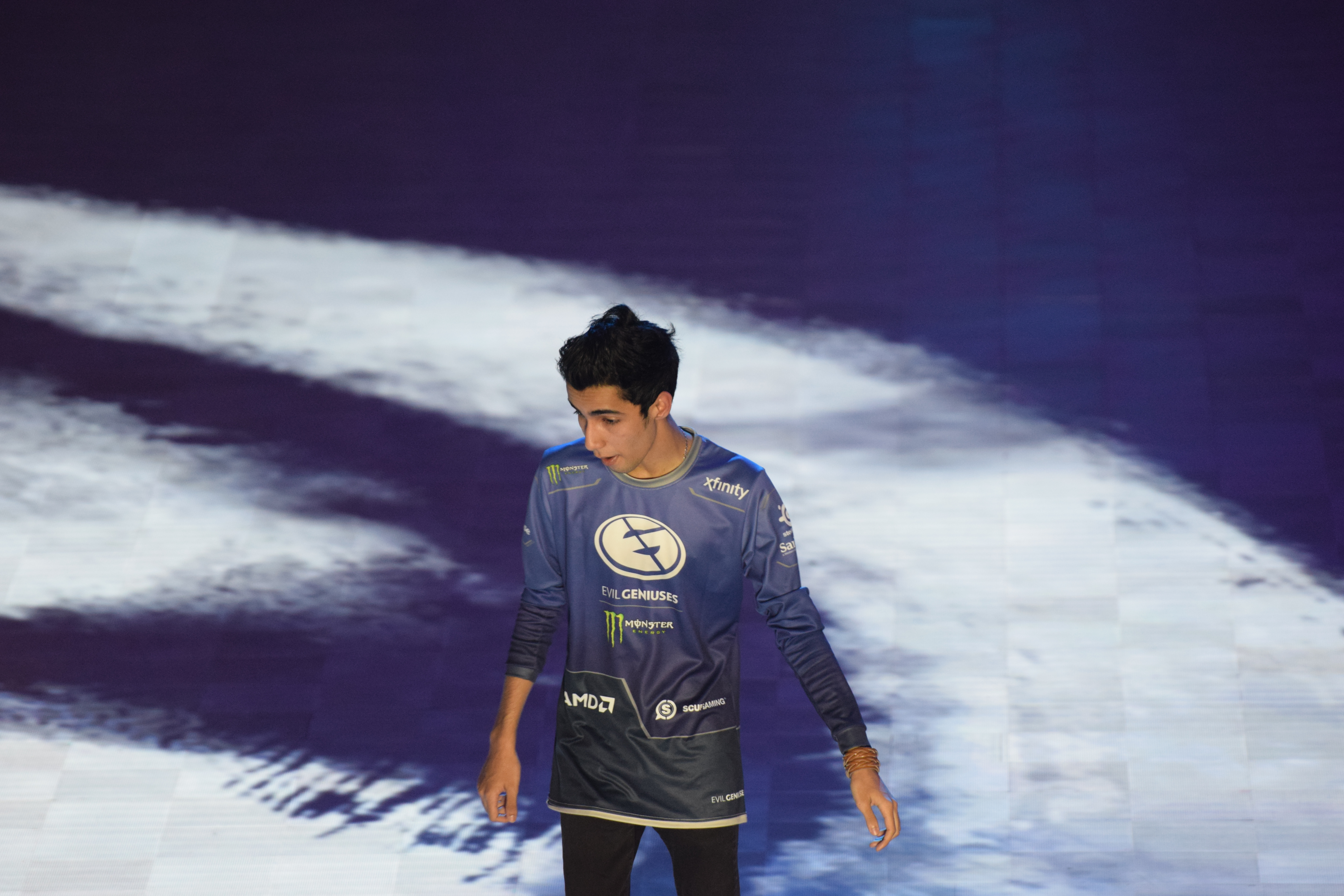 EG.SumaiL